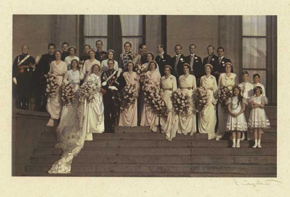 Groepsportret bij het huwelijk van prinses Juliana en prins Bernard, in kleur vastgelegd door Franz Ziegler. Heren v.l.n.r. Willem Roëll, Vinzenz zu Windisch-Graetz, Gerard Beelaerts van Blokland, Gijs van Hardenbroek, E. du Souzy, Cluas Ahlefeldt-Laurvig, Fenton Moran, Aschwin von Cramm, Fabian zu Dohna-Schlodien, Berno von Cramm, Talle von Vietinghoff gen. Scheel, Hans von Welczeck. Dames v.l.n.r. Binebeth Roëll, Elisabeth zur Lippe (met voor haar Kira van Rusland), Ariane de Brauw (voor haar Juliana), Thyra zur Mecklenburg (voor haar Bernhard), Sieglinde zur Lippe, Woizlawa zur Mecklenburg, (schuin achter haar) Jacqueline van Heemstra, Martine del Court van Krimpen, Marguerite Michelin Moreau, Mies Rooseboom. Bruidskinderen: Armin zur Lippe, Caspar van Oeynhausen, Eilika von Oldenburg, Svea von Oeynausen.